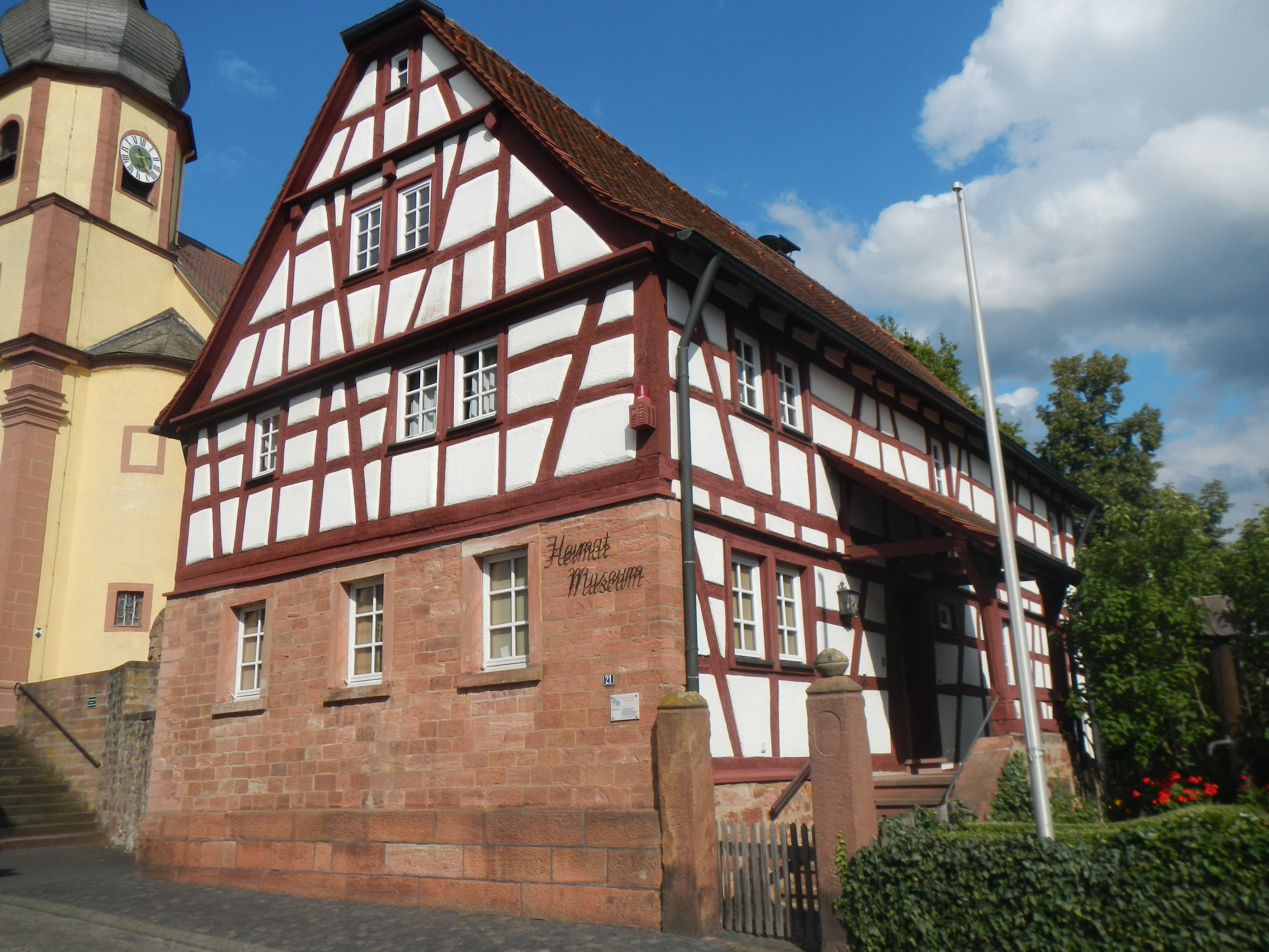 Ehem. Bauernhaus jetzt Museum, giebelständiges zweigeschossiges Fachwerkhaus mit Sandsteinfassade im Erdgeschoss und Krüppelwalmdach, bez. 1751, Hauptstraße 21, AktenNr. D-6-76-121-7